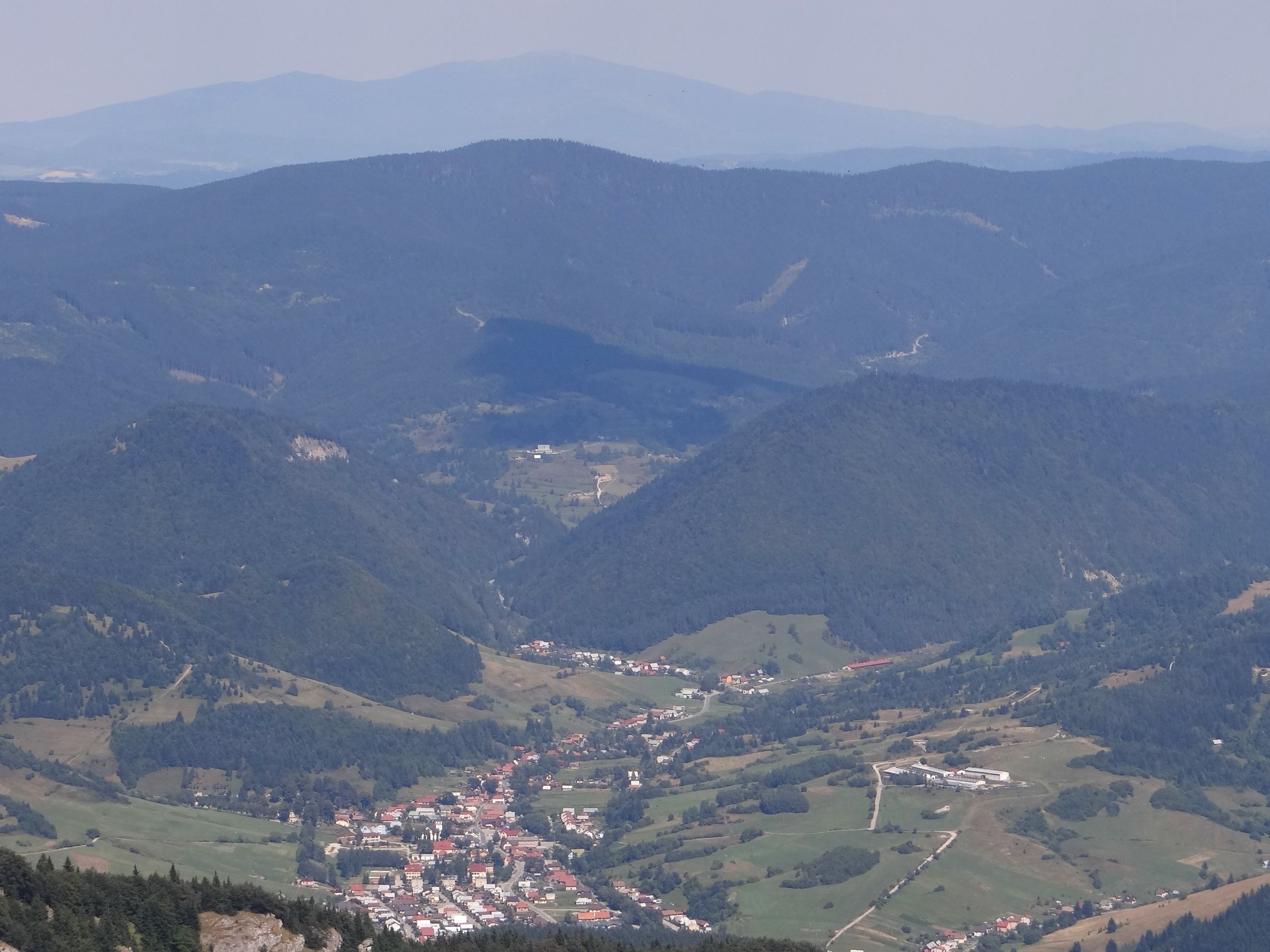 Zázrivá, Kysucka vrchovina